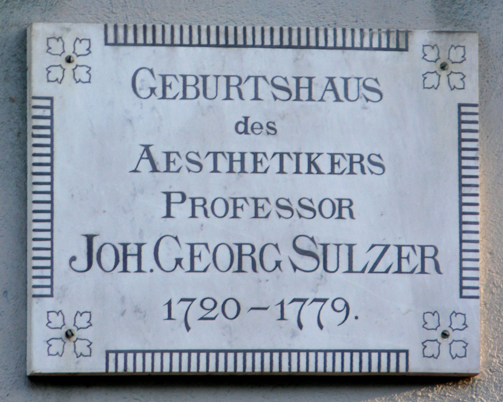 Winterthur, Tafel am Geburtshaus von J. G. Sulzer